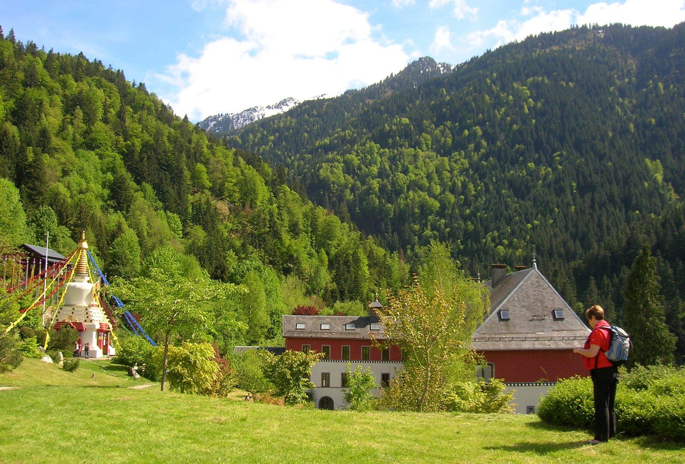 Première journée de "HARMONIE DES STEPPES", Festival culturel mongol de l'Institut Karma Ling. Chartreuse de Saint Hugon, Hameau de Saint Hugon, Arvillard, Isère, AuRA, France.